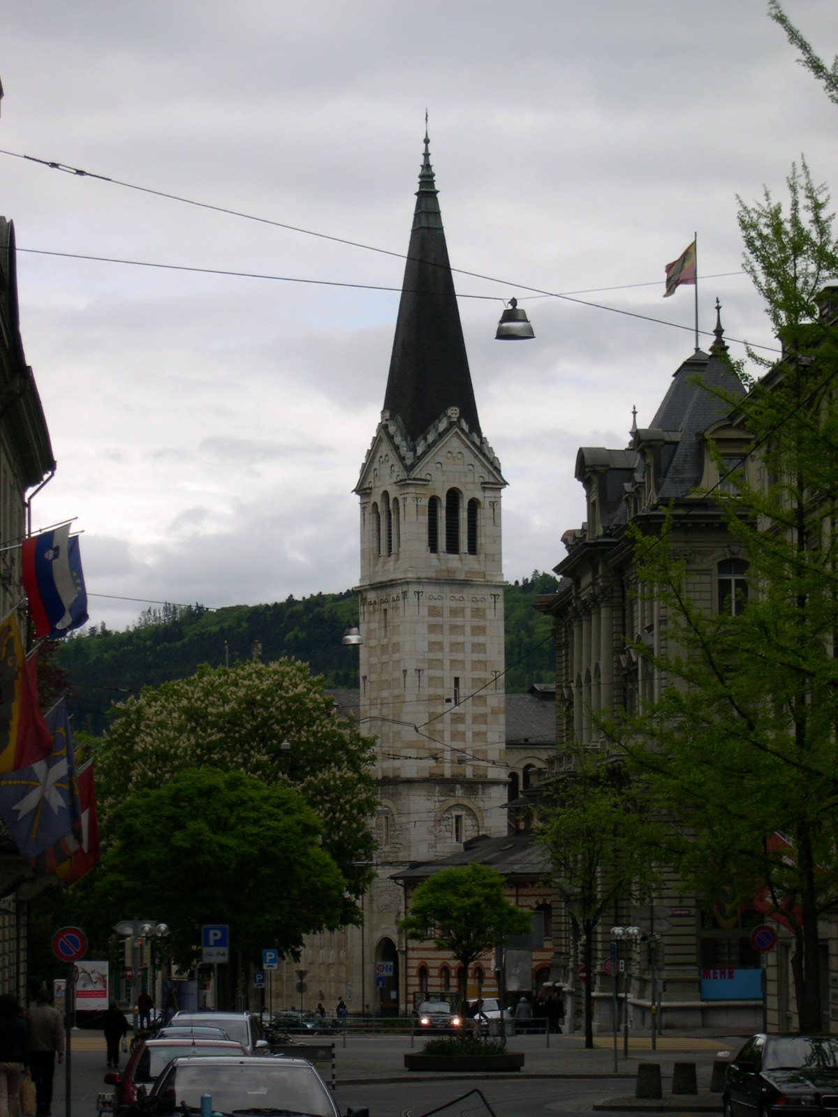 Turm der römisch-katholischen Dreifaltigkeitskirche in Bern, fotografiert von der Schwanengasse